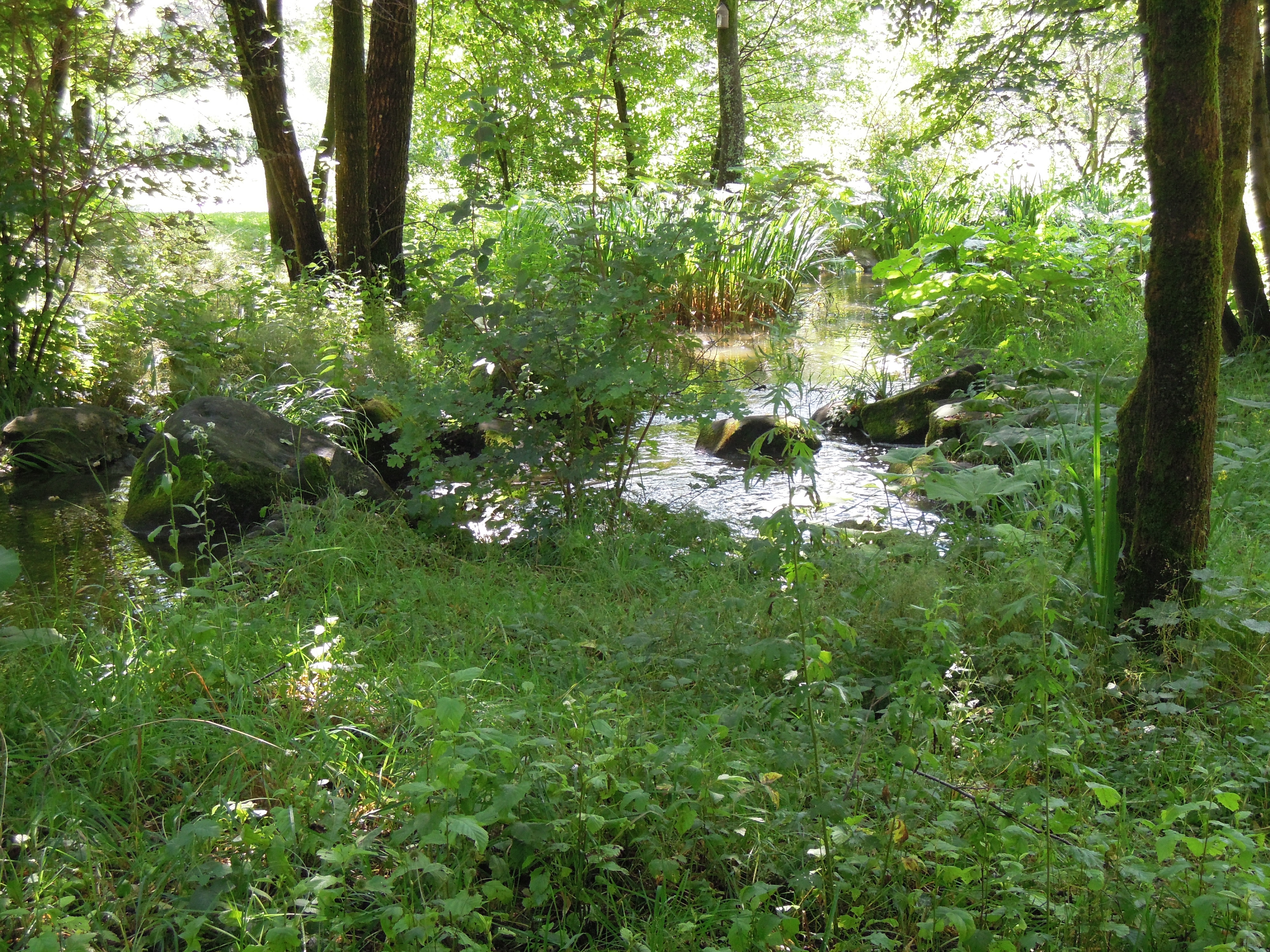 Westpark (München) - Farntal